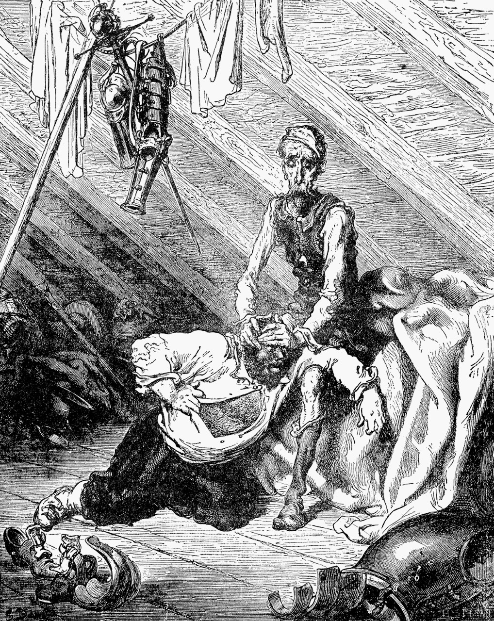 Dom Quixote ampara Sancho Pança que vomita